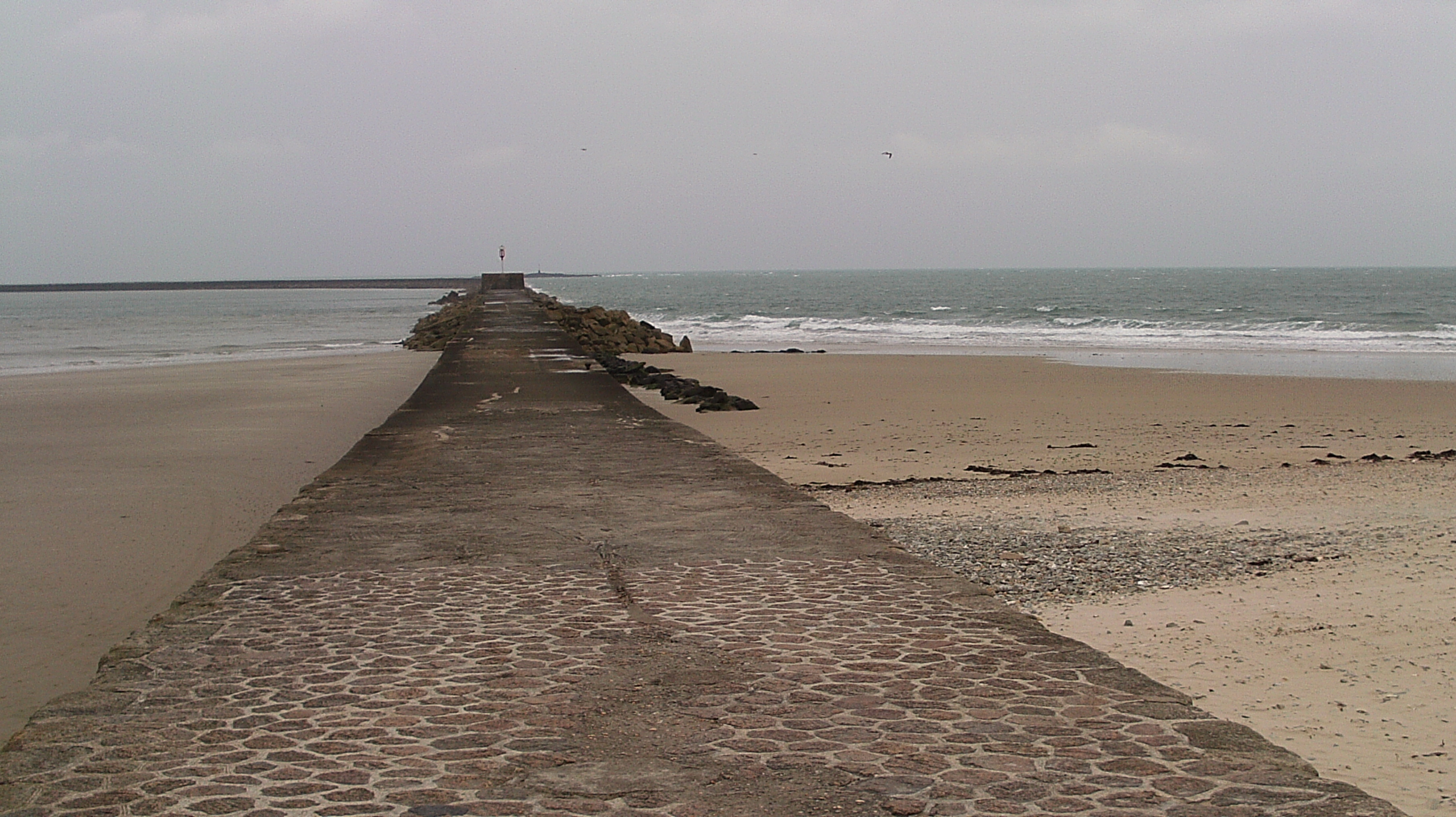 Digue à Tourlaville